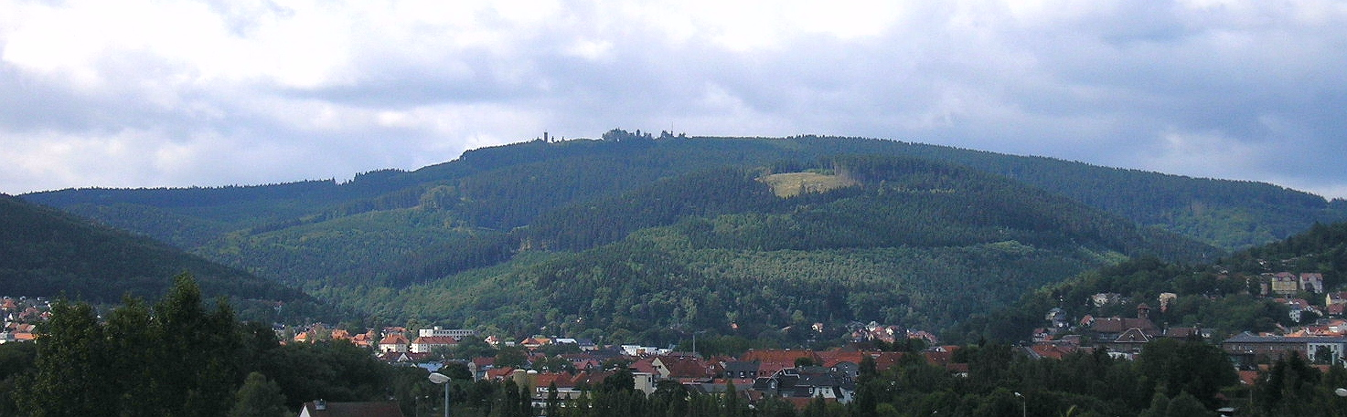 Der Kickelhahn bei Ilmenau (Thüringen), davor die Stadt. Aufgenommen: am Vogelherd, Pörlitzer Höhe